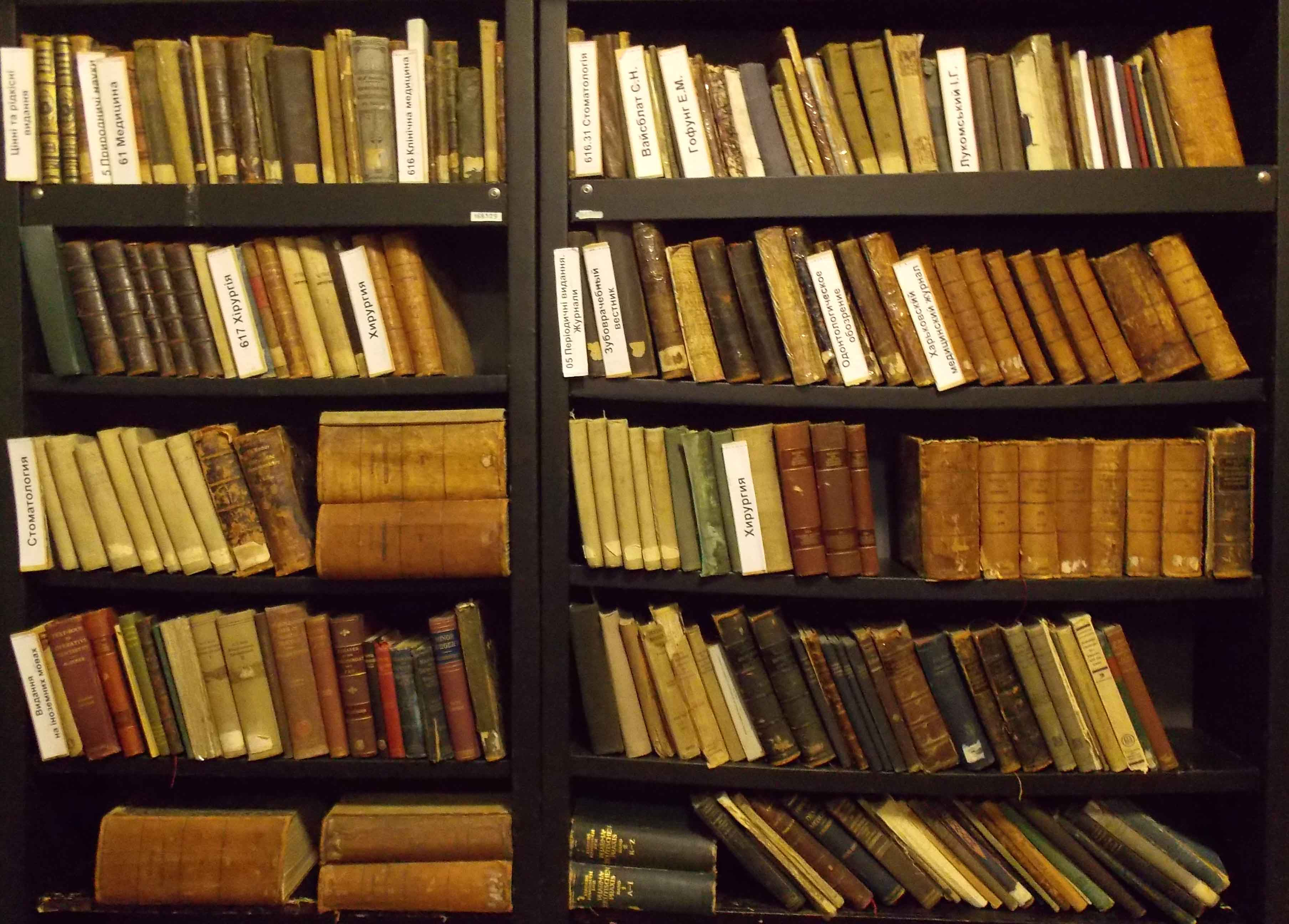 Старовинні книги бібліотеки ВДНЗУ "УМСА"